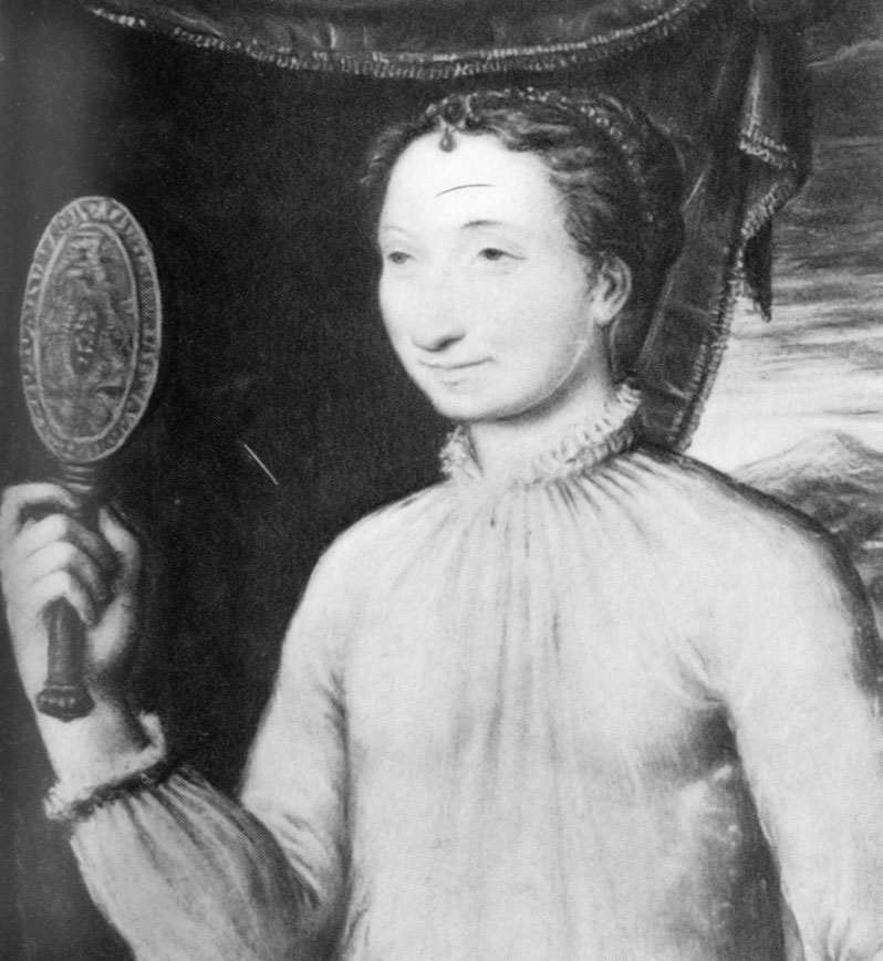 Marguerite de Navarre